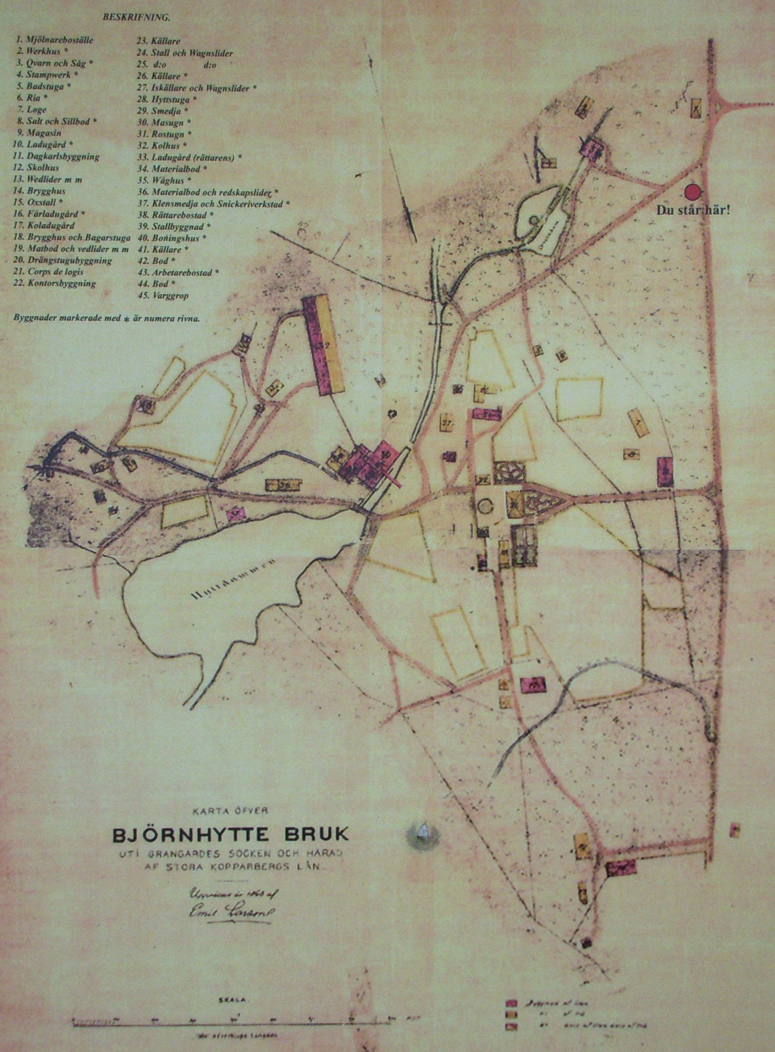 Björnhytte bruk karta 1800-tal